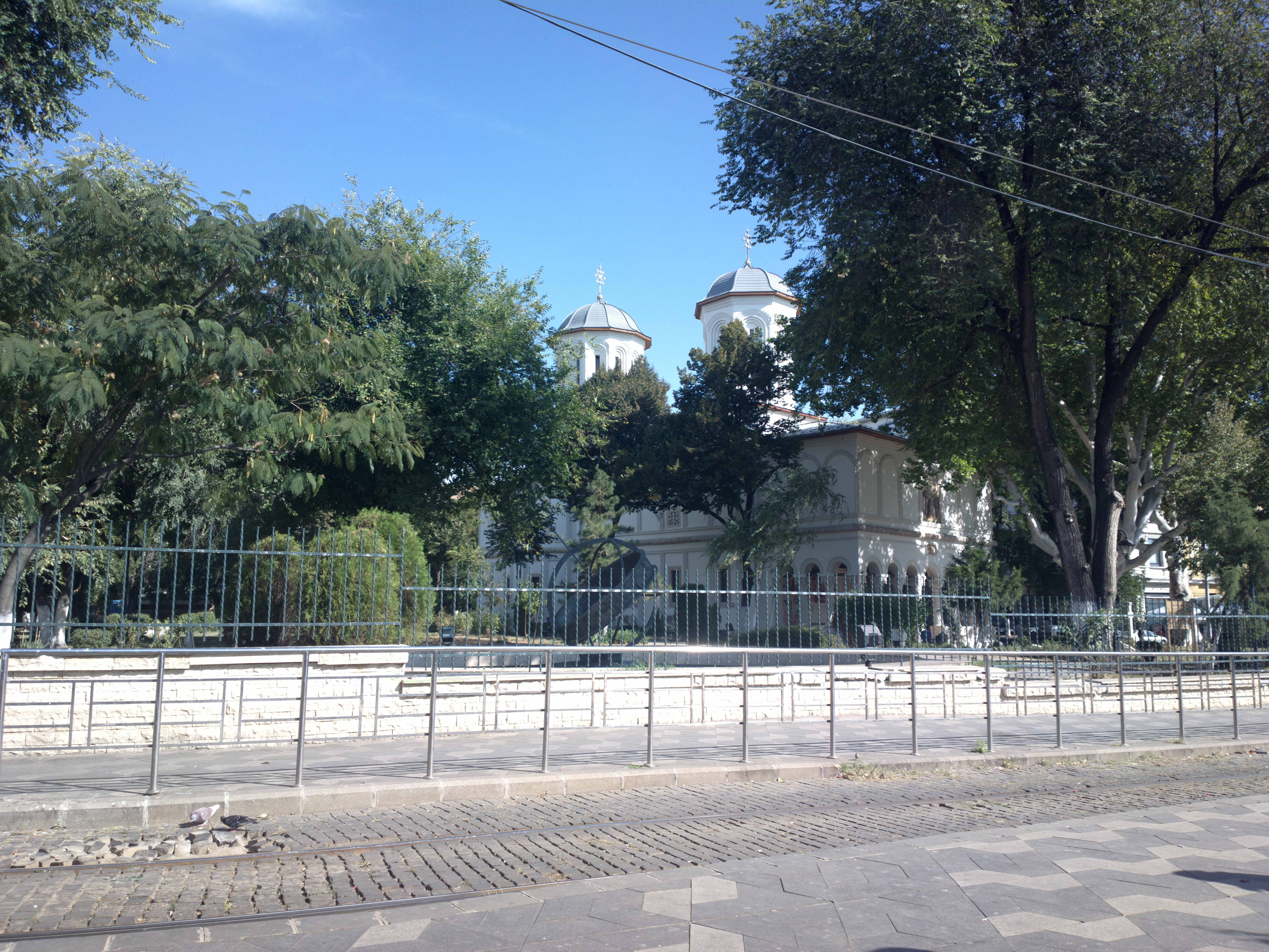 Biserica Sf. Gheorghe Nou